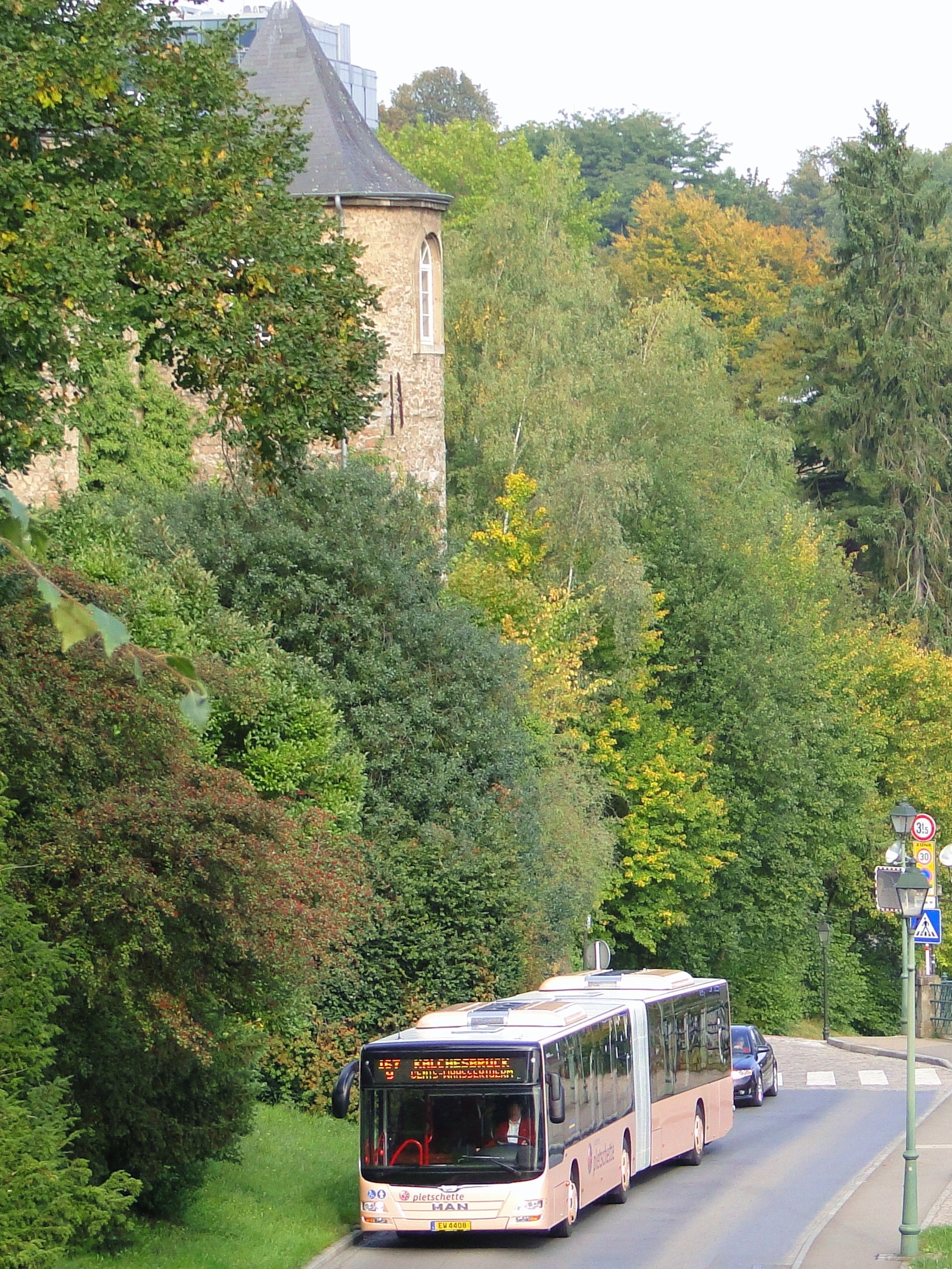 Bus Pletschette (EW 4408) Marque: MAN Um Boulevard Victor Thorn op der Kombilinn 9/167.